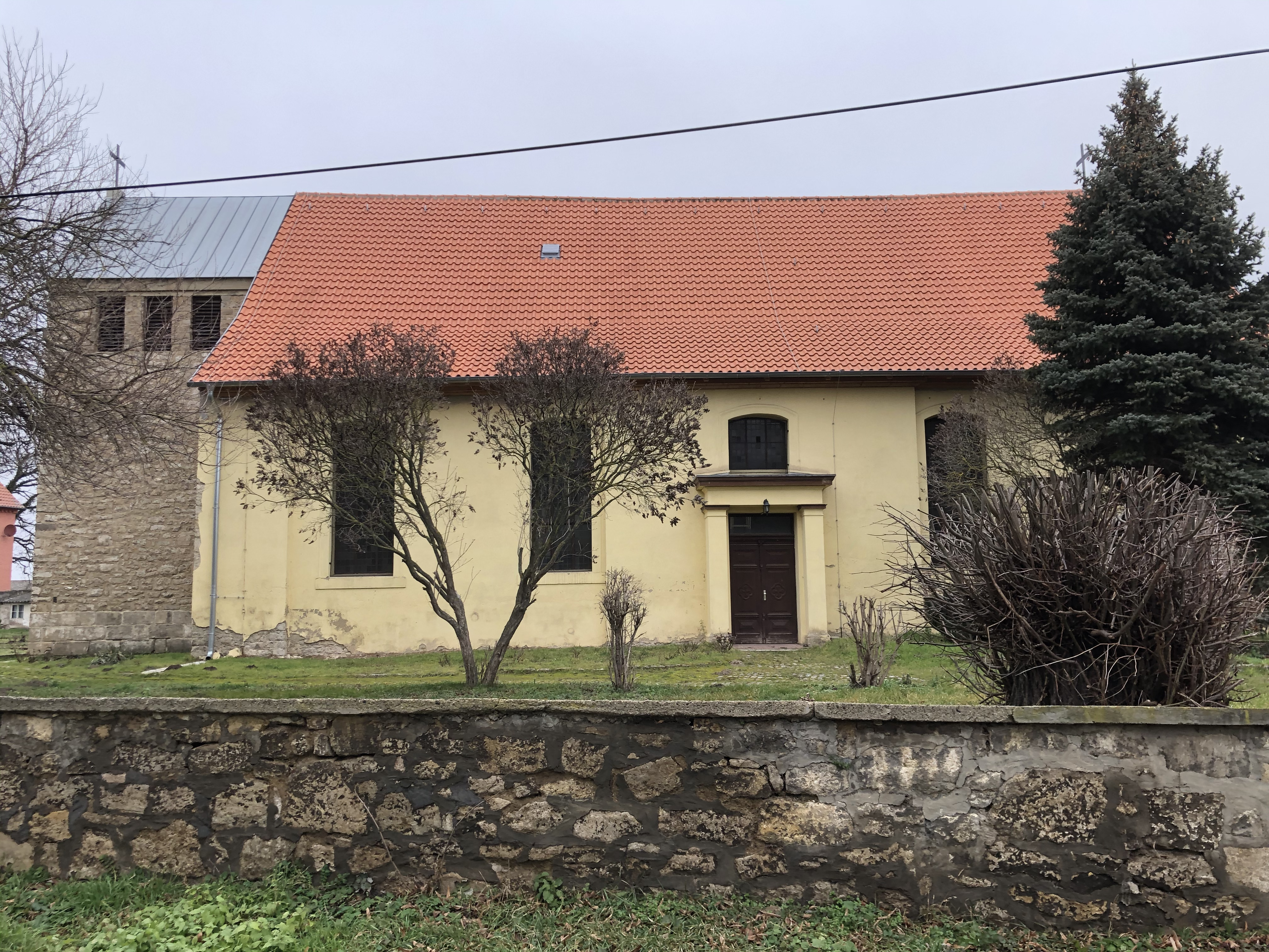 Kirche in Hedersleben evangelisch